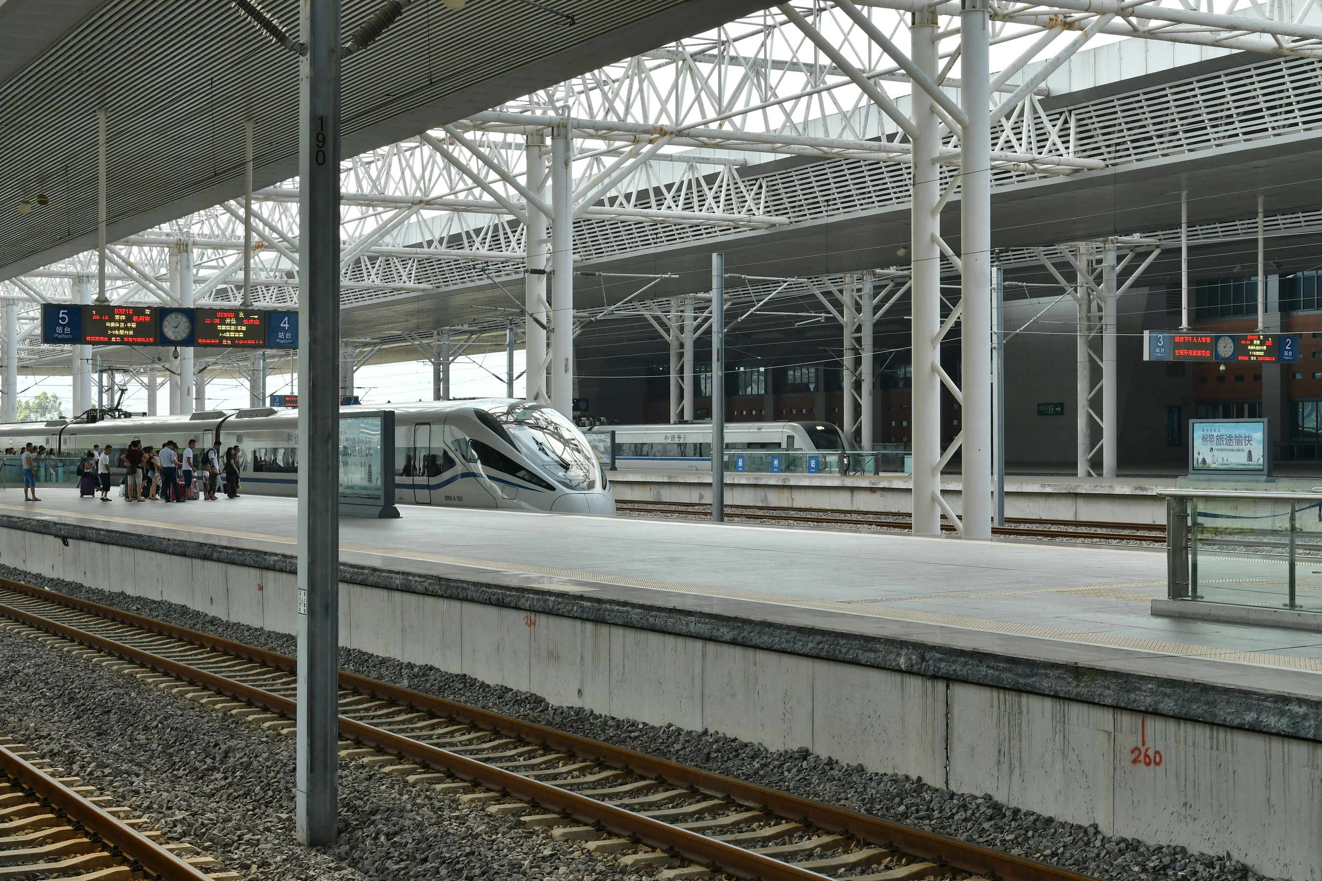 泉州站站台